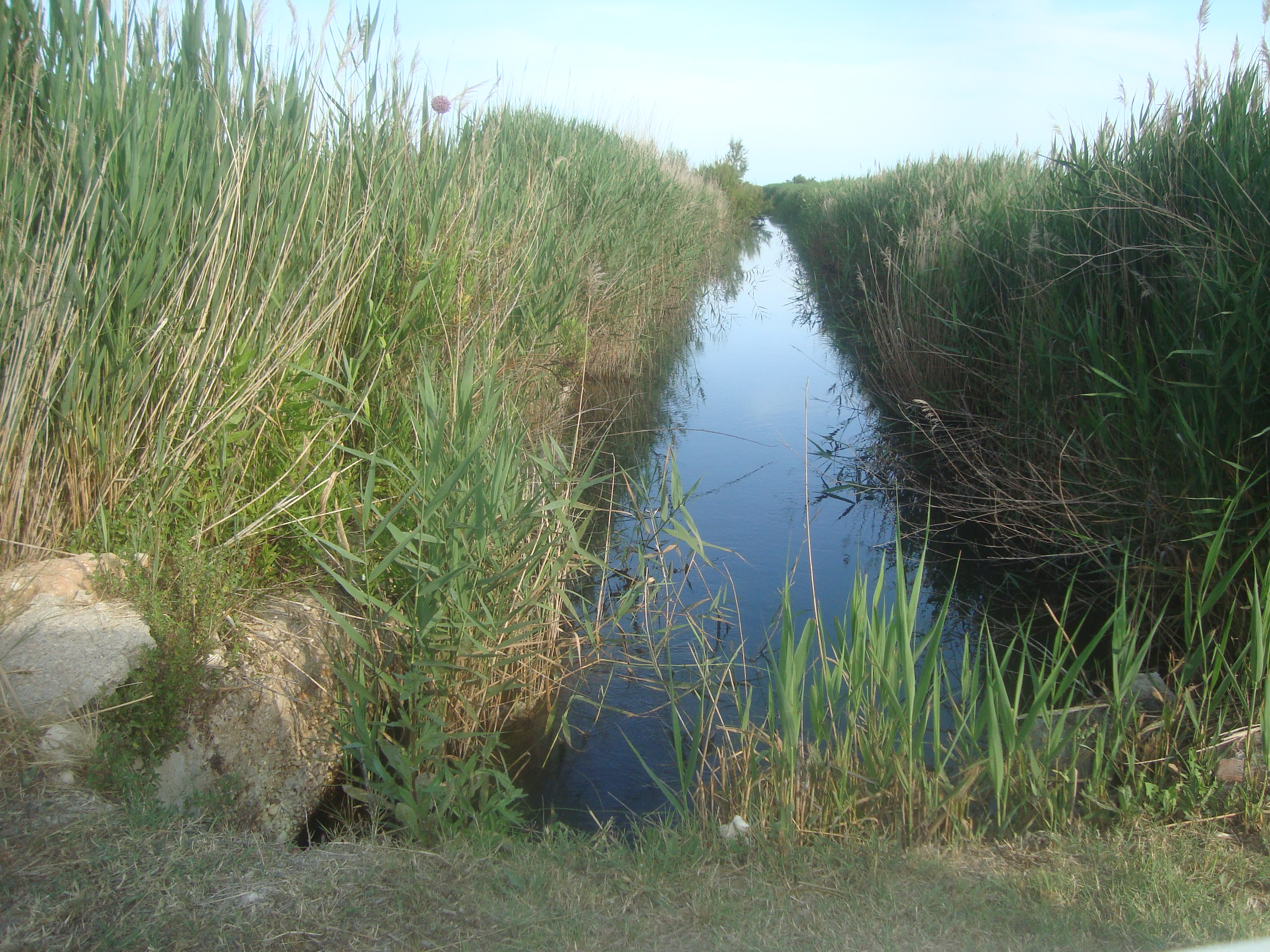 Prat de Cabanes i Torreblanca . This is a photography of a Special Area of Conservation in Spain with the ID: ES0000060. Natura2000 entry, EEA entry